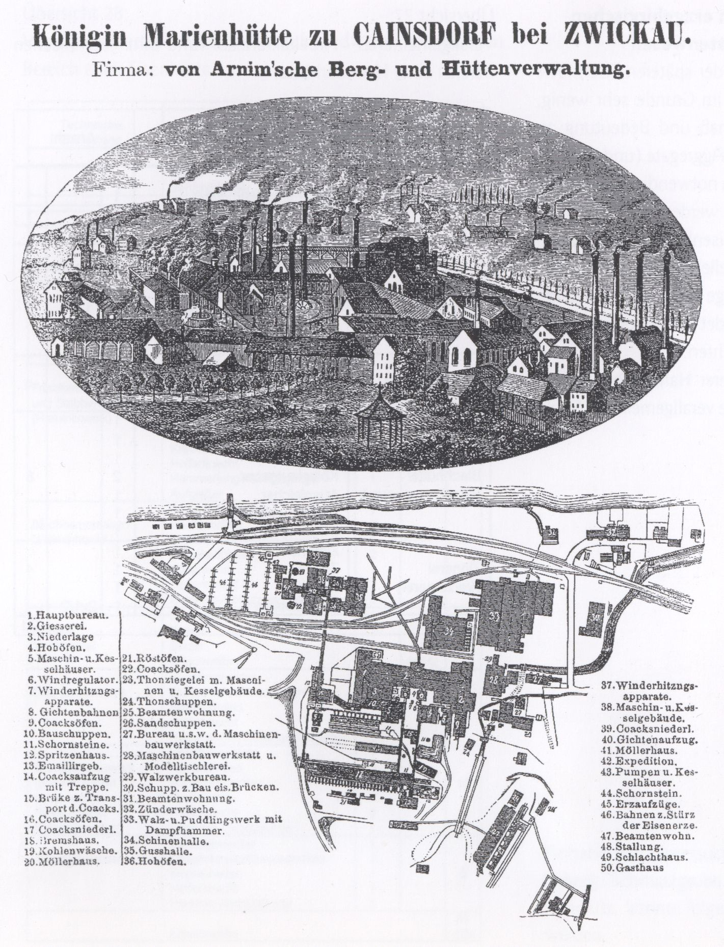 Königin-Marien-Hütte in Cainsdorf um 1861